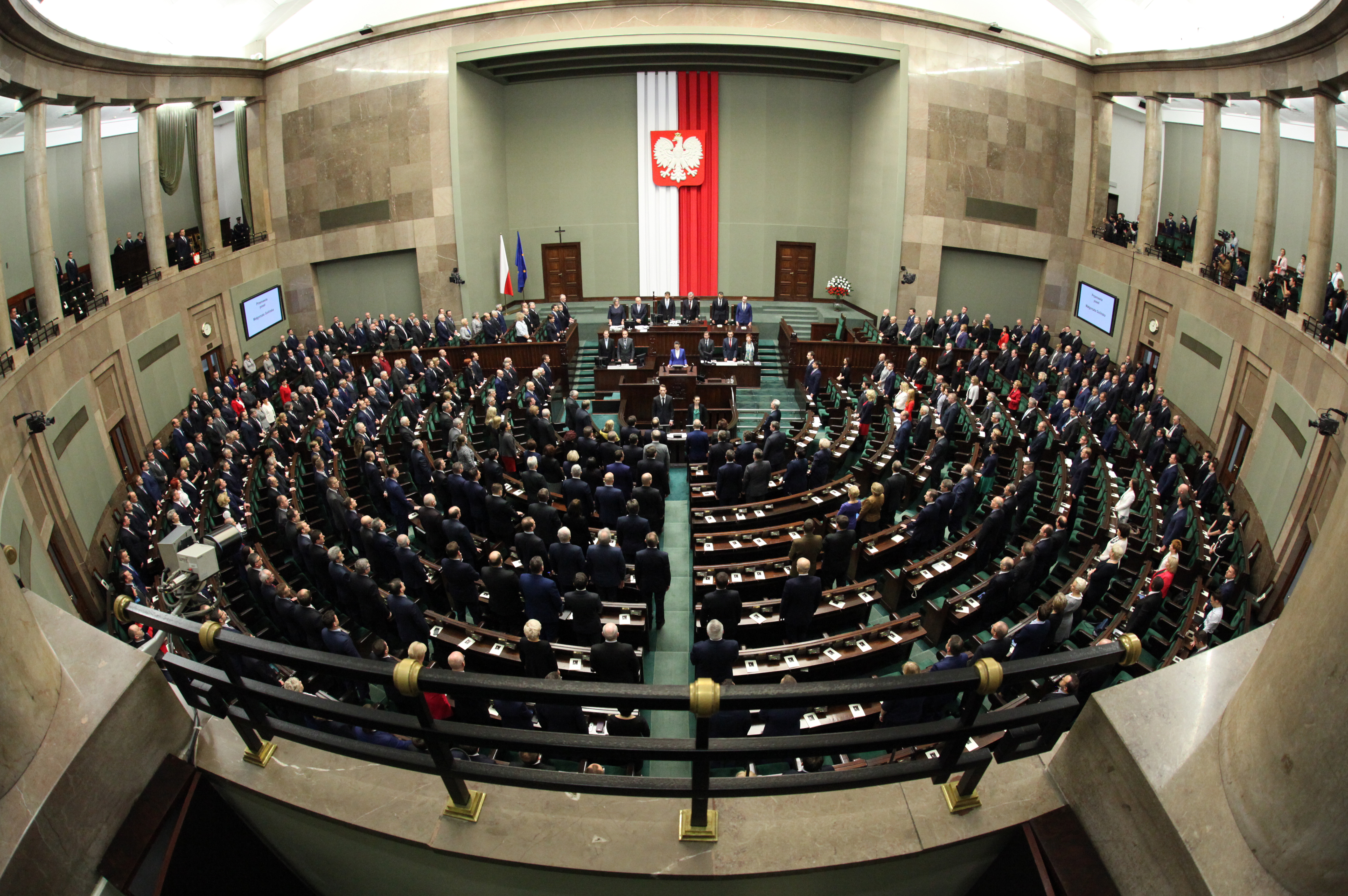 Zgromadzenie posłów i senatorów z okazji 10. rocznicy zaprzysiężenia Lecha Kaczyńskiego na prezydenta